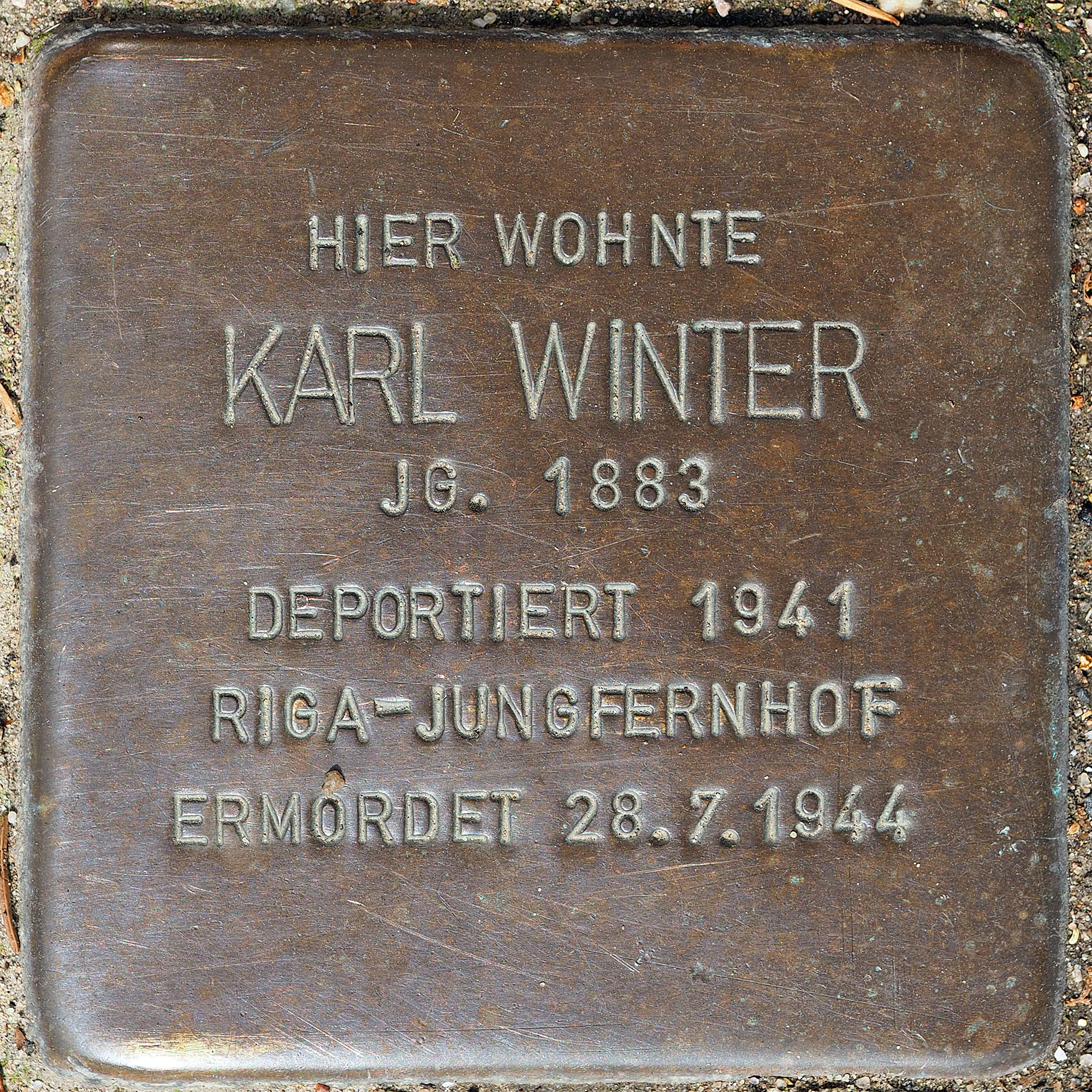 Stolpersteine GV: Winter, Karl